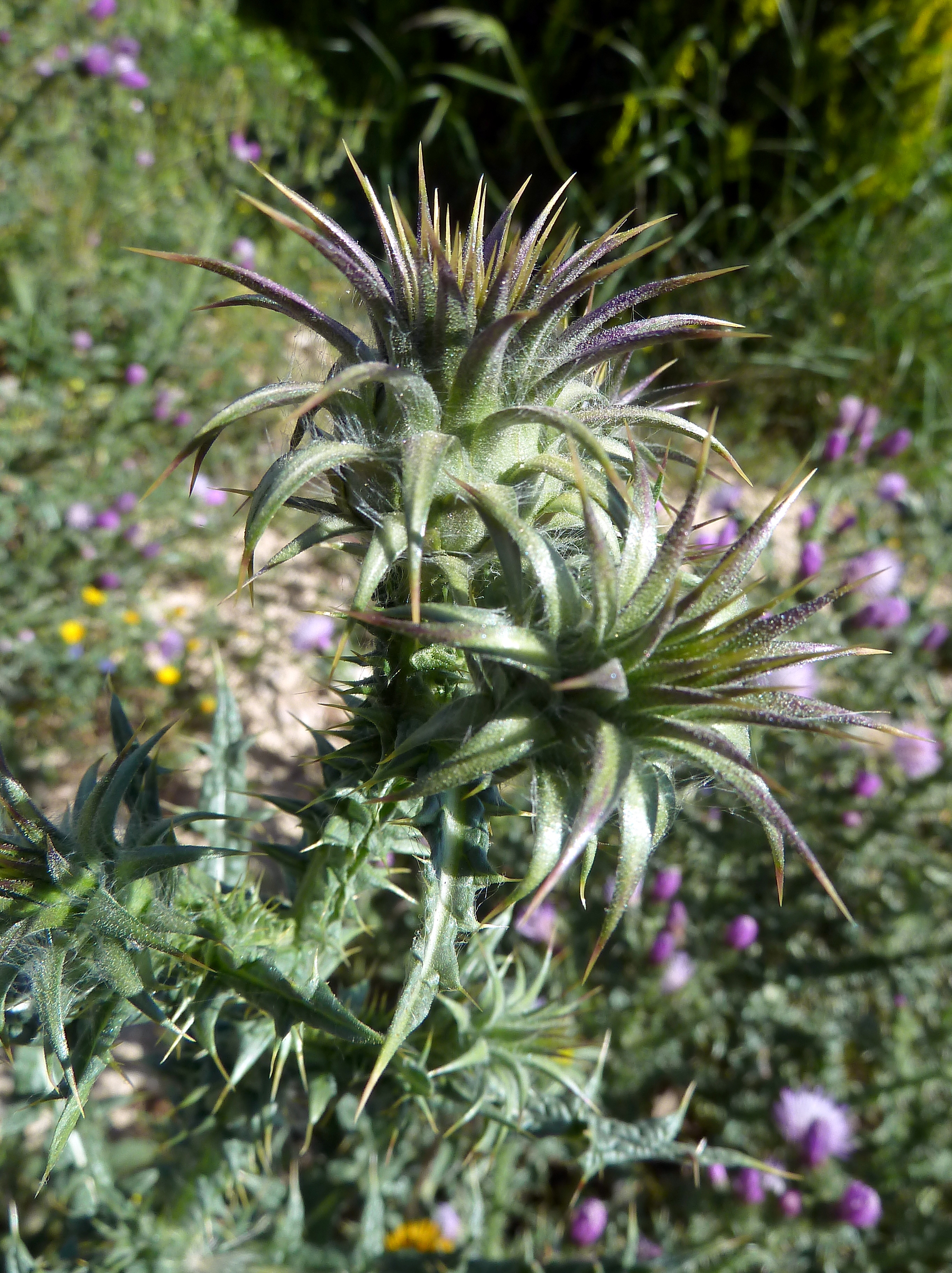 Onopordum corymbosum (Cardencha, Cardo-toro) - Capítulos en preantesis - Estación de Servicio Shell, Autovía de Alicante (A31) km140,2, circa Almansa (Provincia de Albacete, España) .